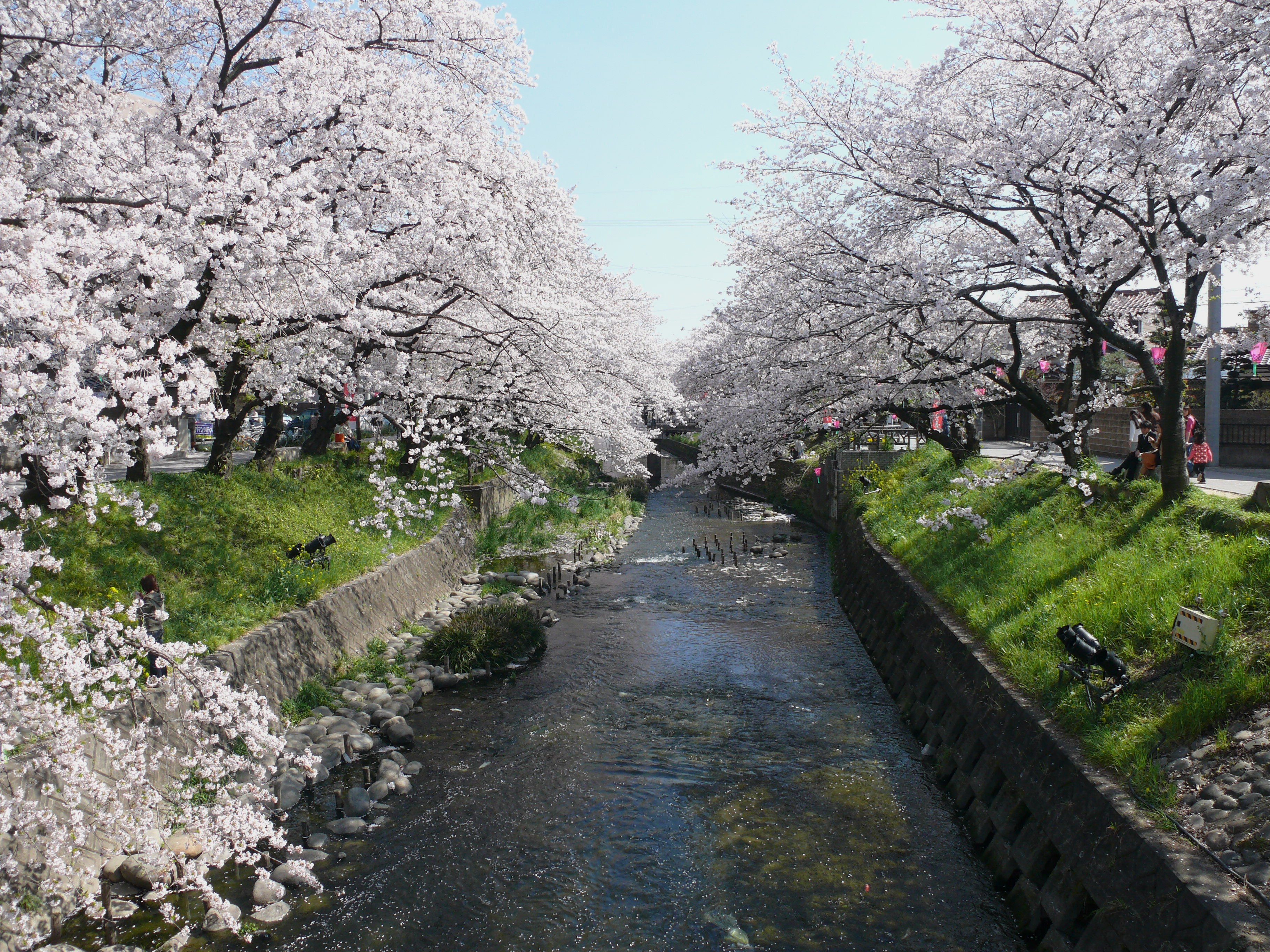 日本の愛知県岩倉市一豊橋付近の五条川